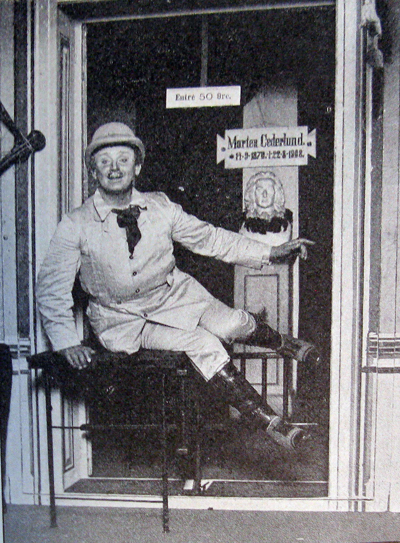 Peter Fjelstrup (24. marts 1866 - 5. juni 1920) var en dansk skuespiller og teaterdirektør.